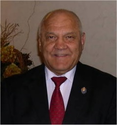 Immagine del parlamentare italo-romeno Mircea Grosaru